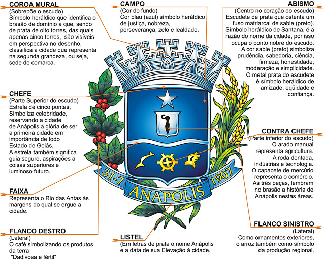 Brasão Oficial do Município de Anápolis